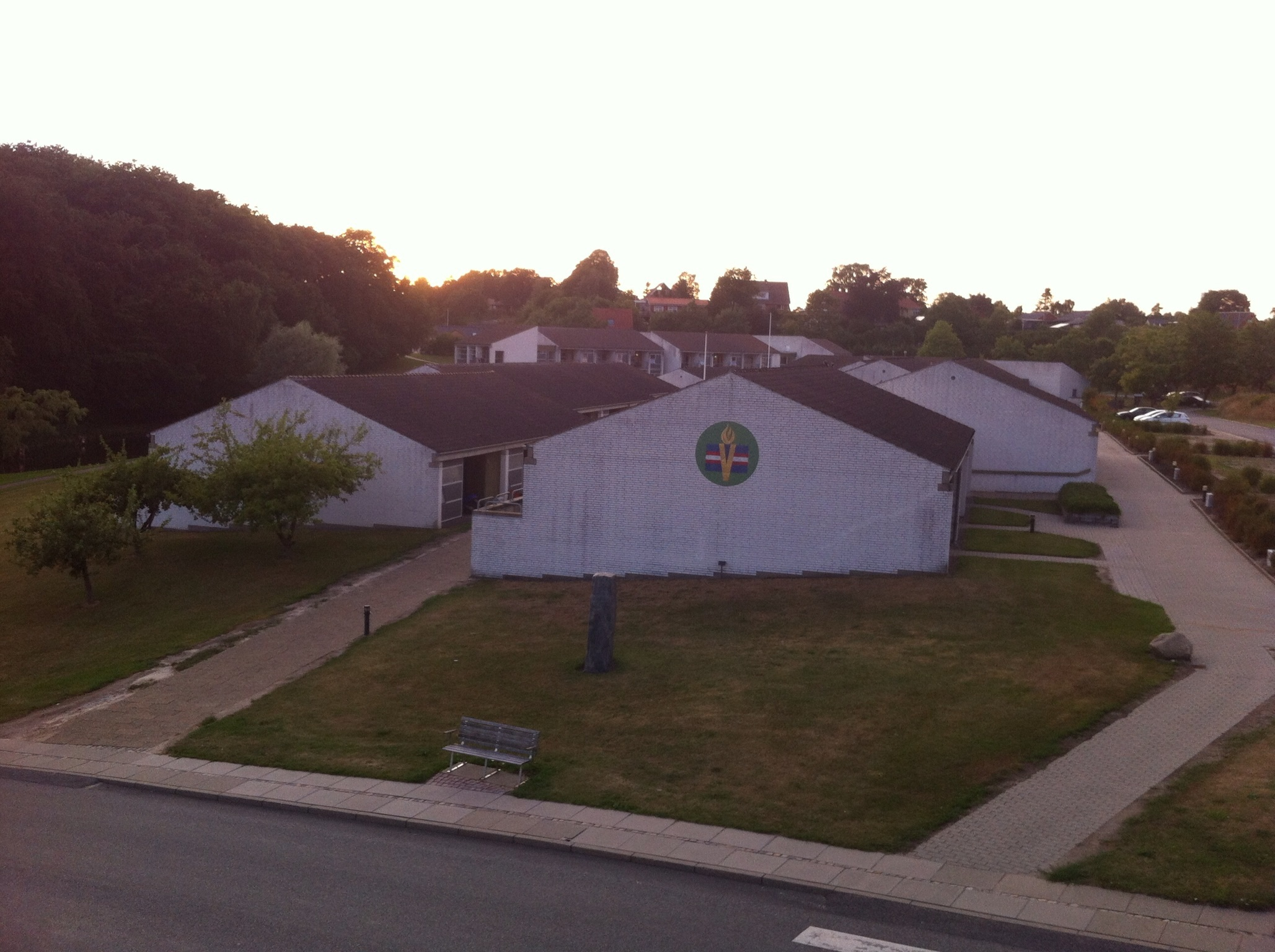 Bernadottegåren på Hornbechsvej i Hadsund.